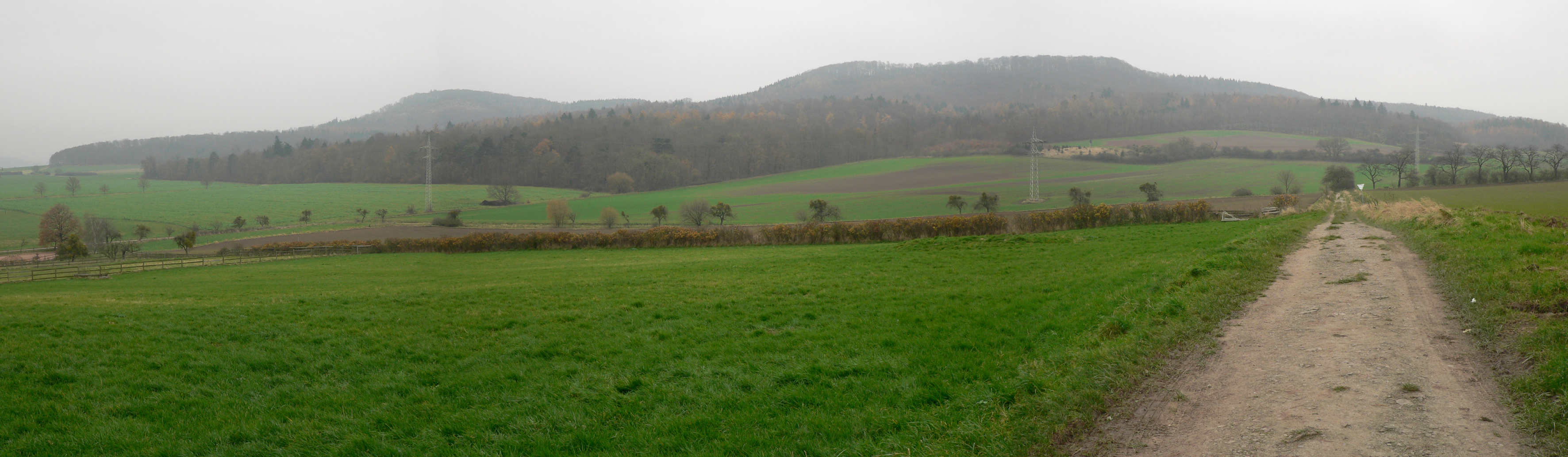 Blick vom Schlachtdenkmal aus auf den Schecken und einen Teil des Schlachtfeldes bei Hastenbeck